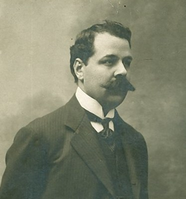 Nicolae Dobrescu (n. 20 iulie 1874, Celeiu, azi aparținând de orașul Corabia, județul Olt, d. 10/23 iulie 1914, București)